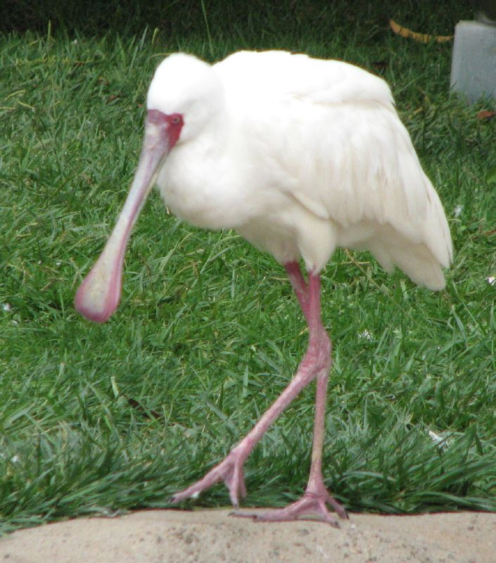 Platalea alba